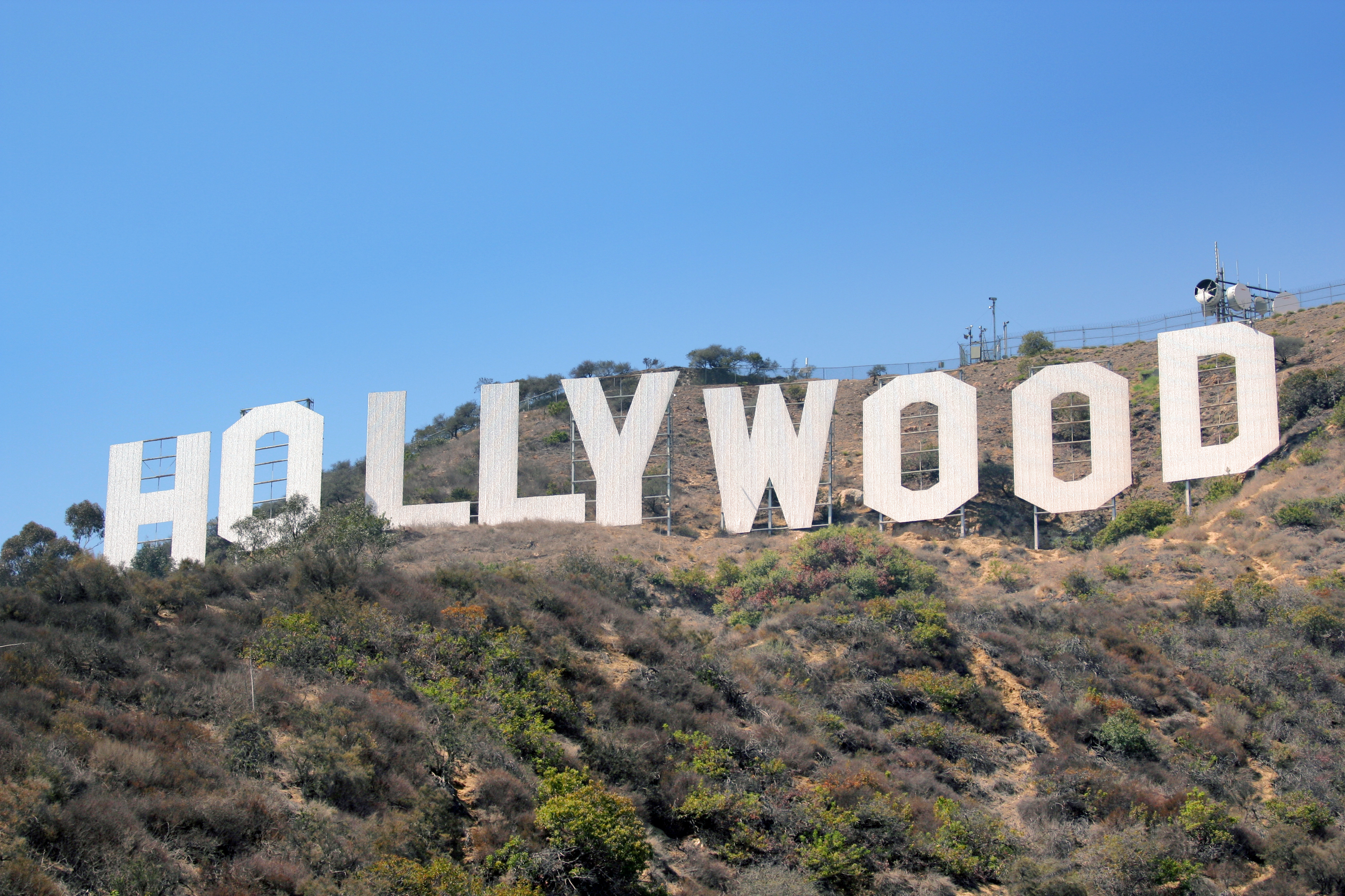 Hollywood SignHollywood Sign